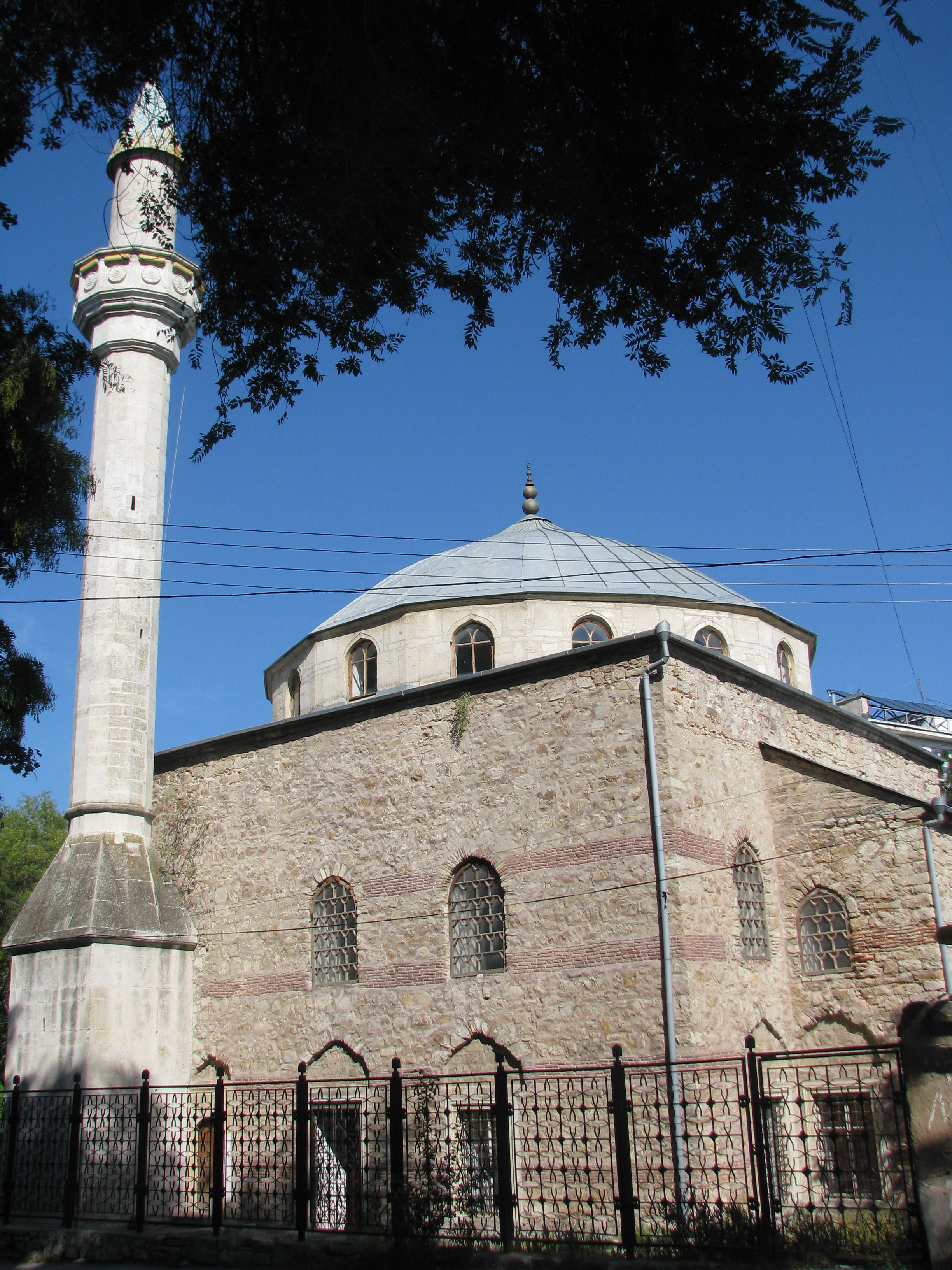 Мечеть Муфти-Джамі XIV — XV ст. у місті Феодосія